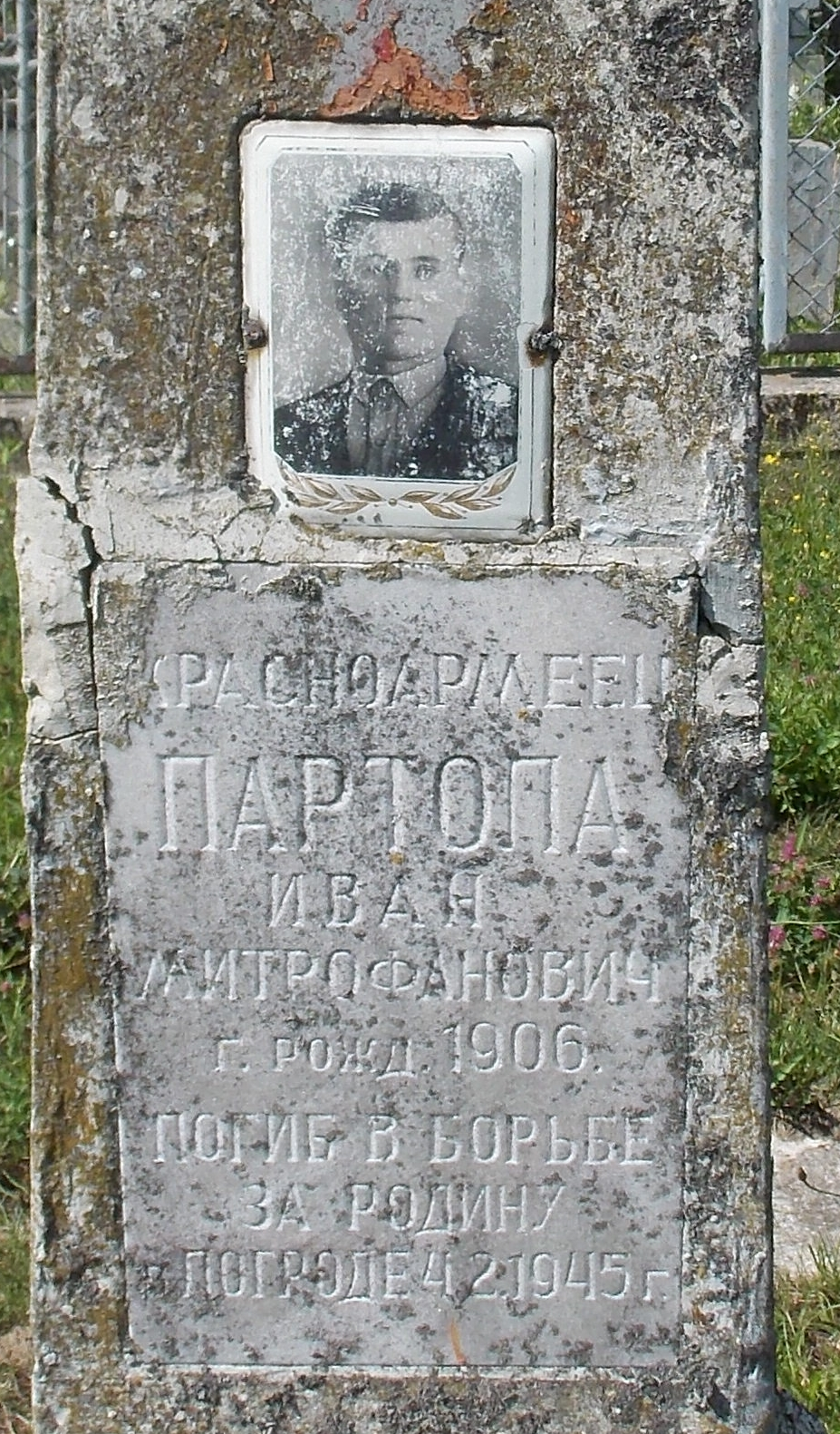 Pogrodzie